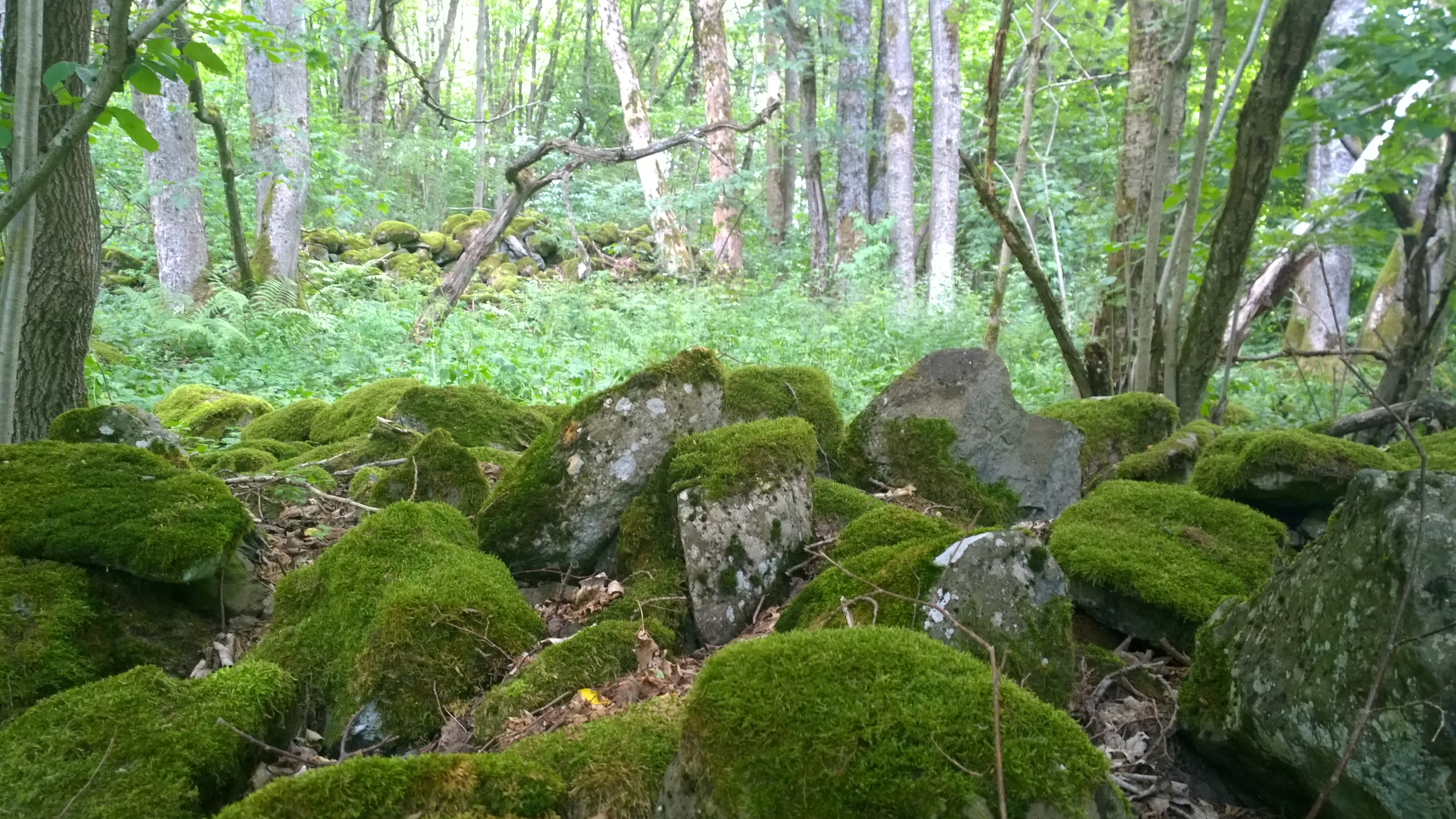 die Wüstung Hauenstein in der Rhön unterhalb des heutigen Rhönhofes Richtung Hausen (Rhön)